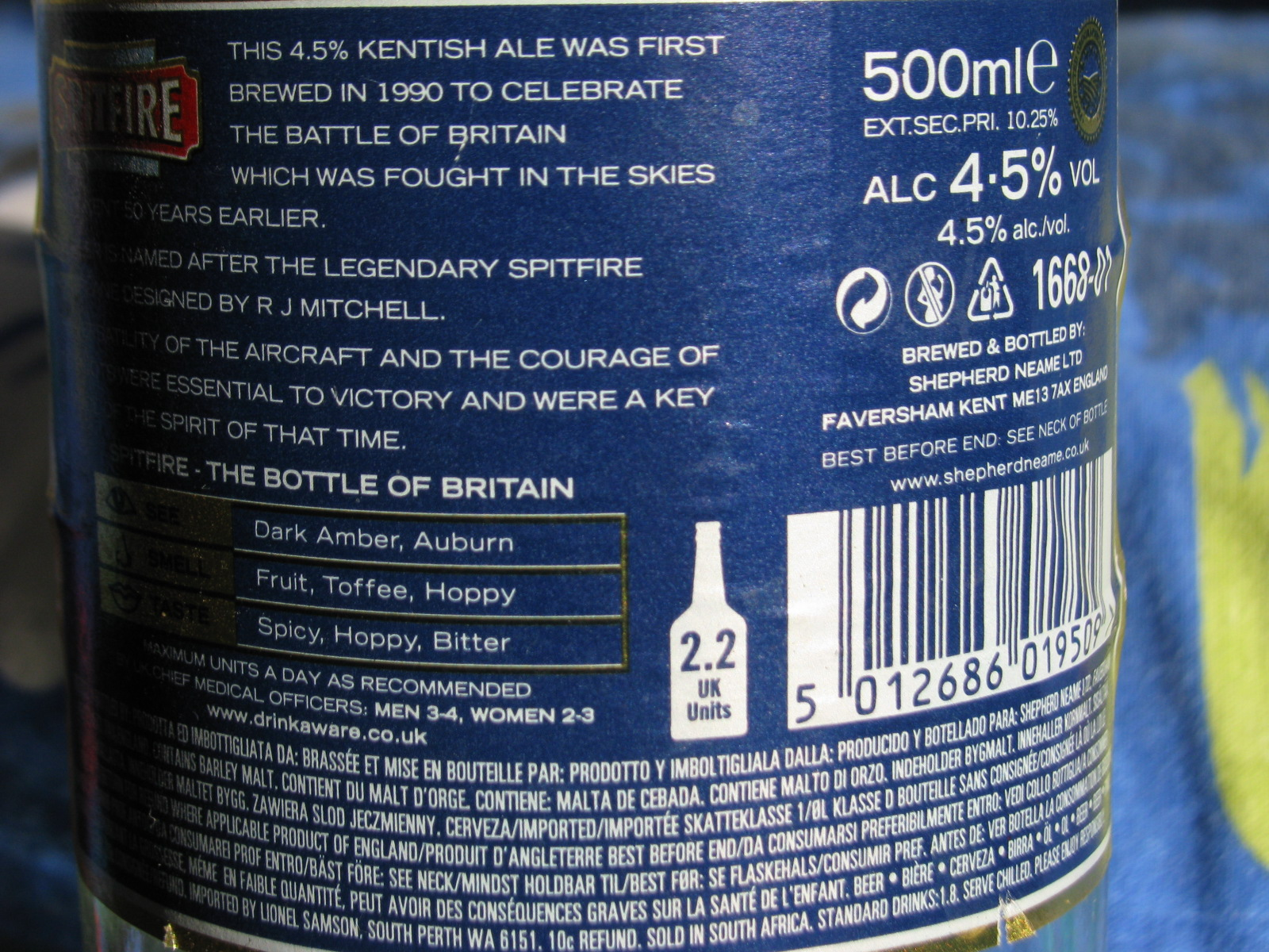 étiquette de bière spitfire